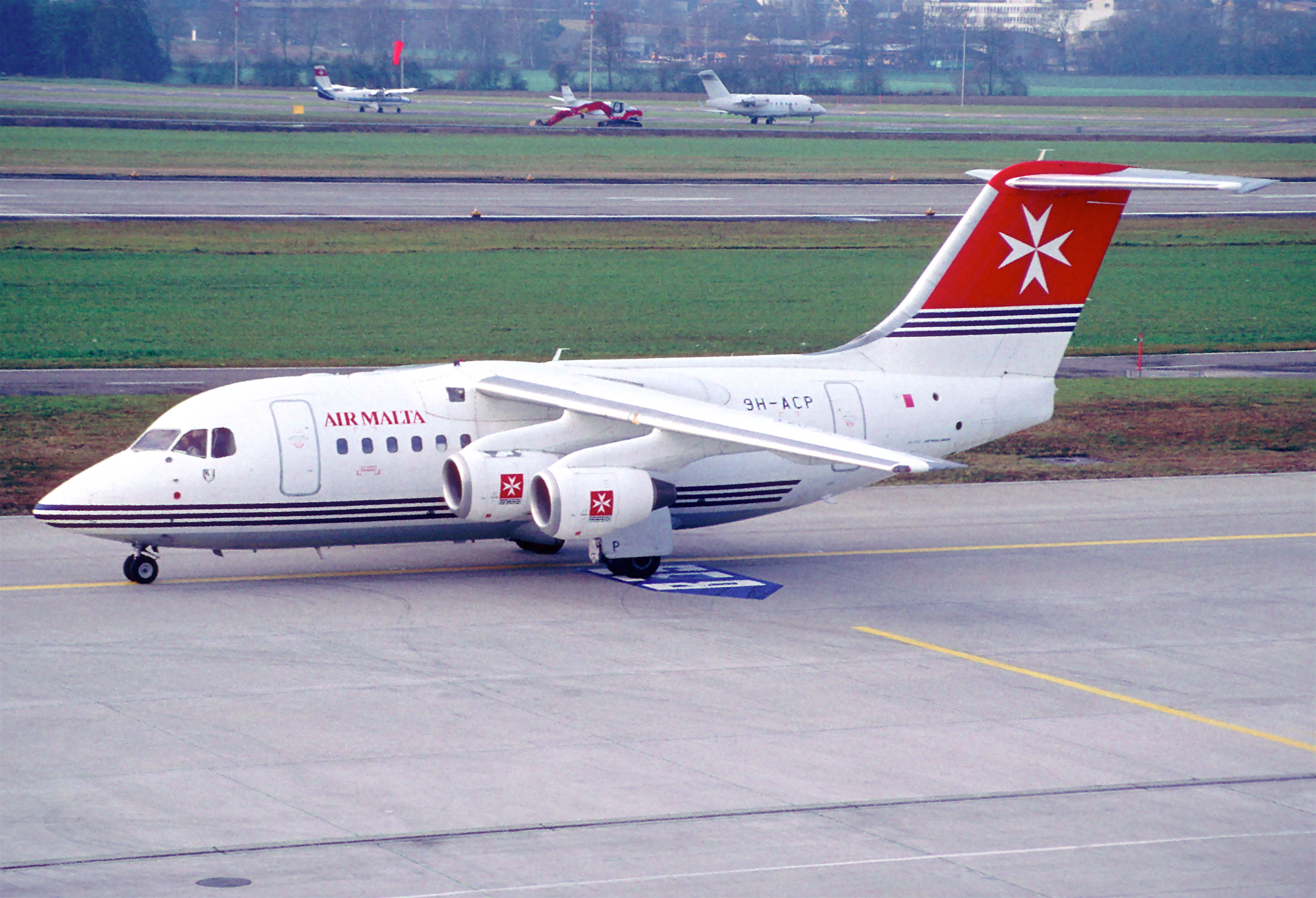 2ac - Air Malta Avro RJ 70; 9H-ACP@ZRH;14.12.1997